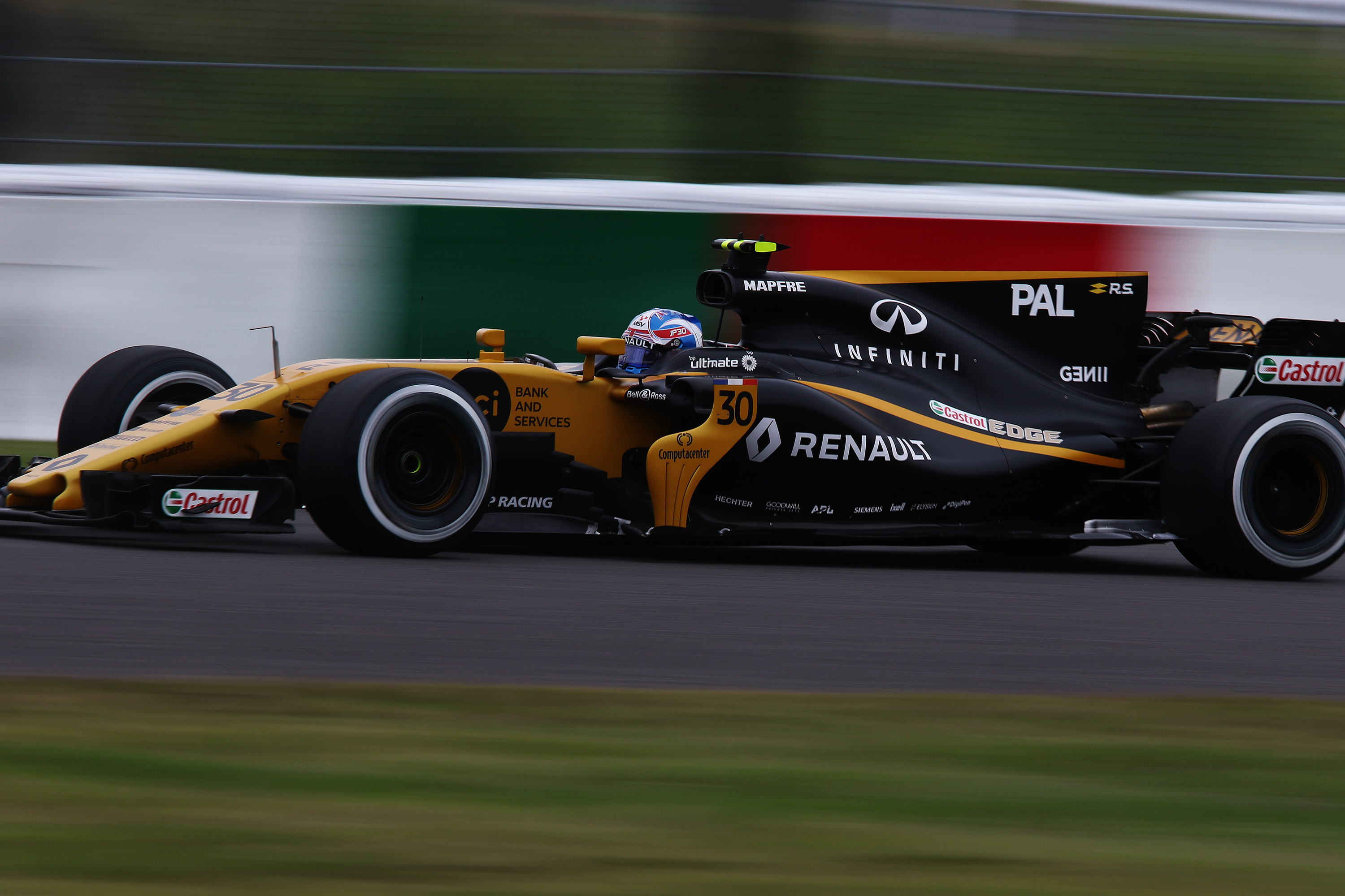 2017.10.6 F1 Rd.16 Japanese GP SUZUKA (FP1) Renault Sport F1 Team (RS17) 30 ジョリオン・パーマー [7D2_9552ks]